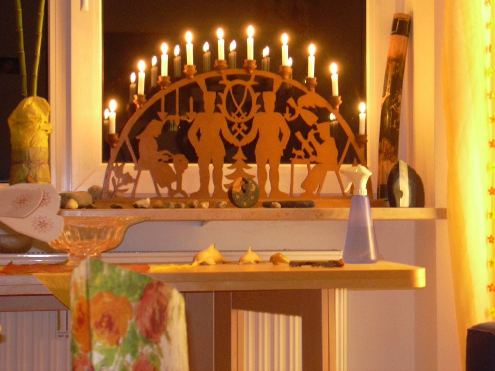 Foto eines Schwibbogen